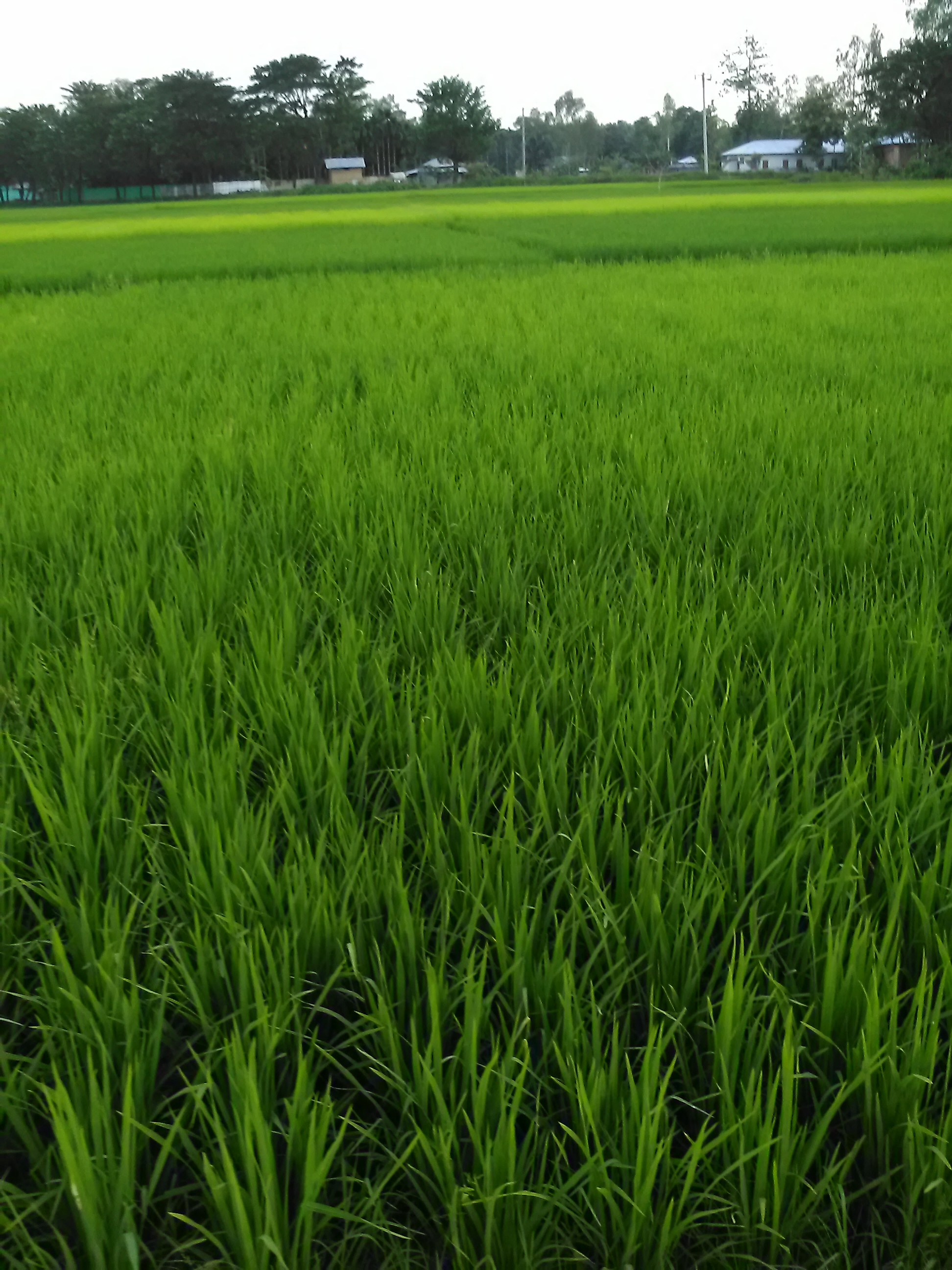 মানিকপুরের তামাক ক্ষেত